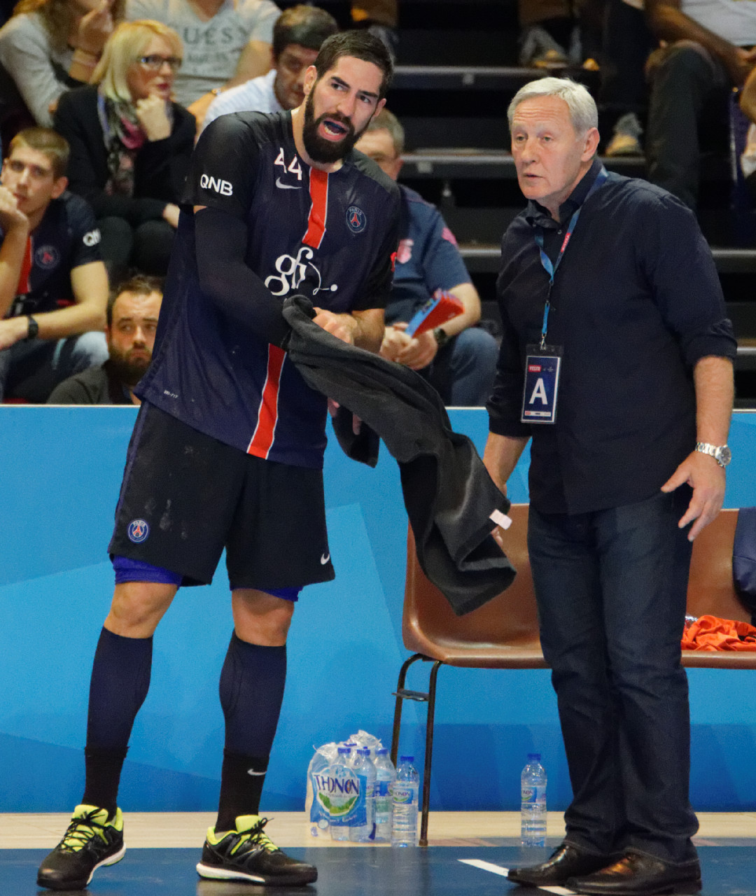 Match entre le PSG et Zagreb. A Coubertin, le 11 octobre 2015.